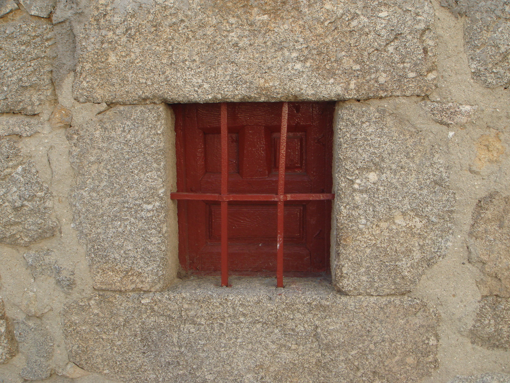 Arquitectura popular. Pequeña ventana con portezuela de madera. La Torre (Ávila), España.